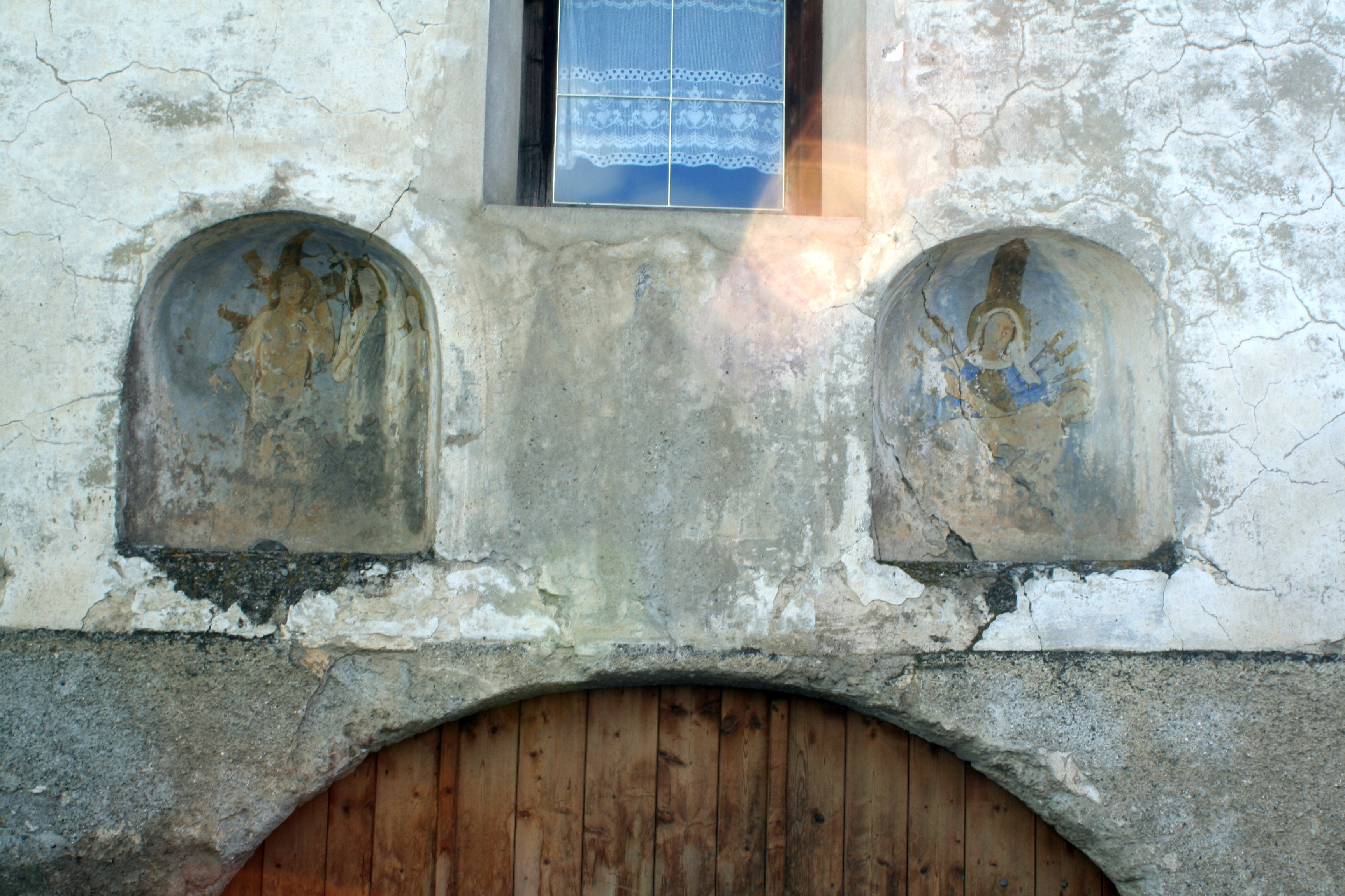 Das Gebäude Schneidergasse 5 in Laas (Südtirol). Es bildet zusammen mit dem angebauten Haus Vinschgaustraße 47 ein geschütztes Baudenkmal.